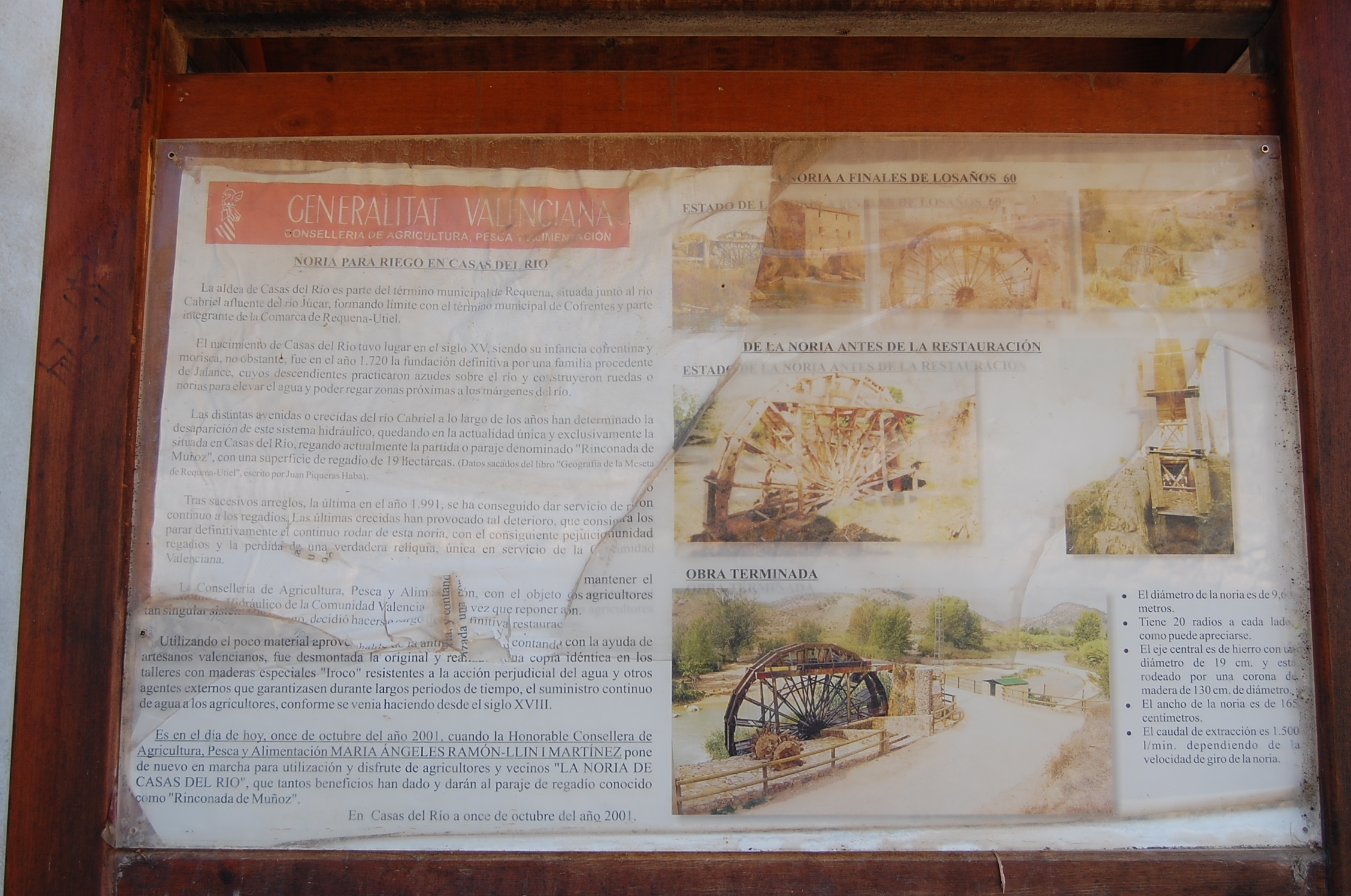 Restauracion noria 2001